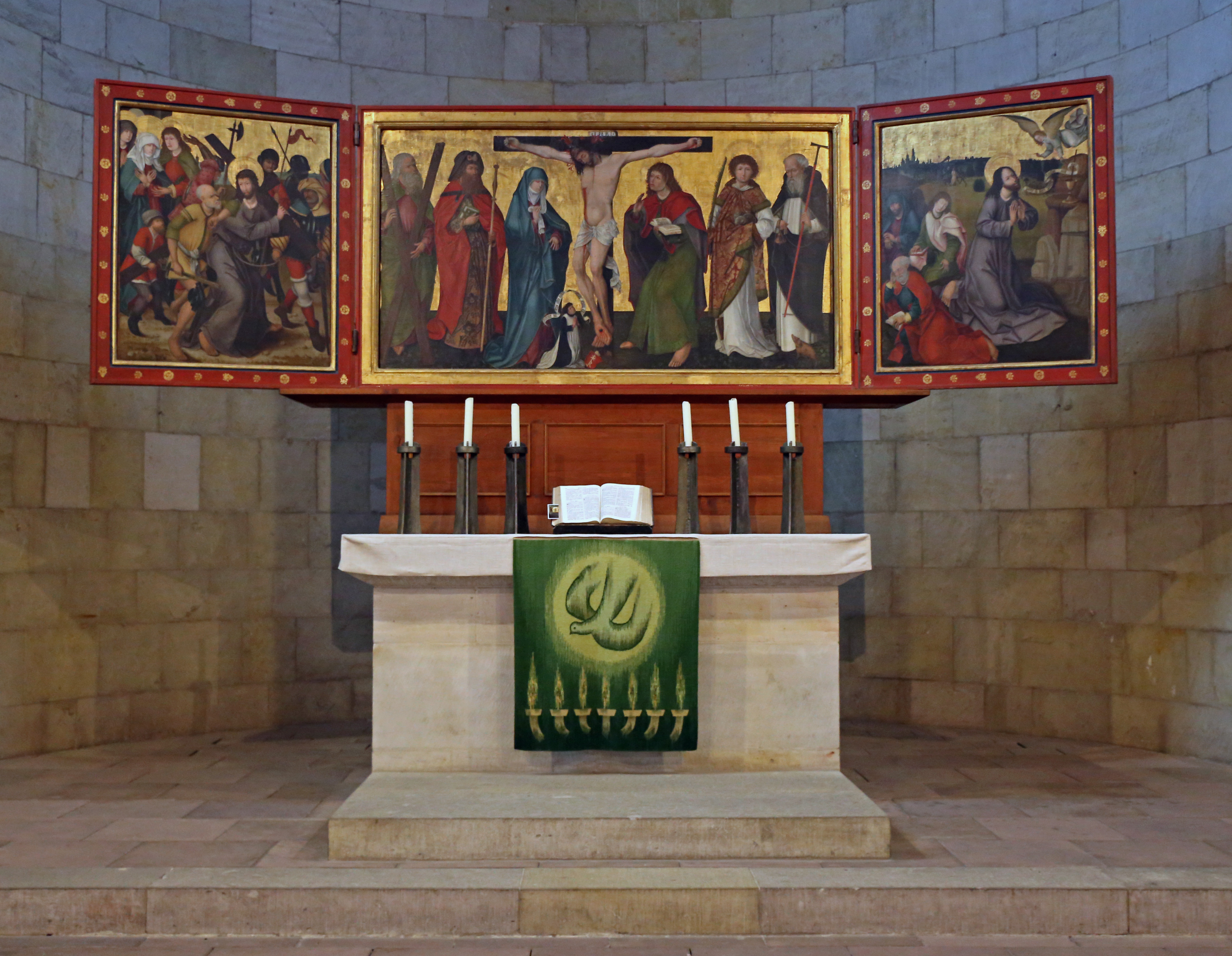 Altar in der Stiftskirche St. Servatius in Quedlinburg